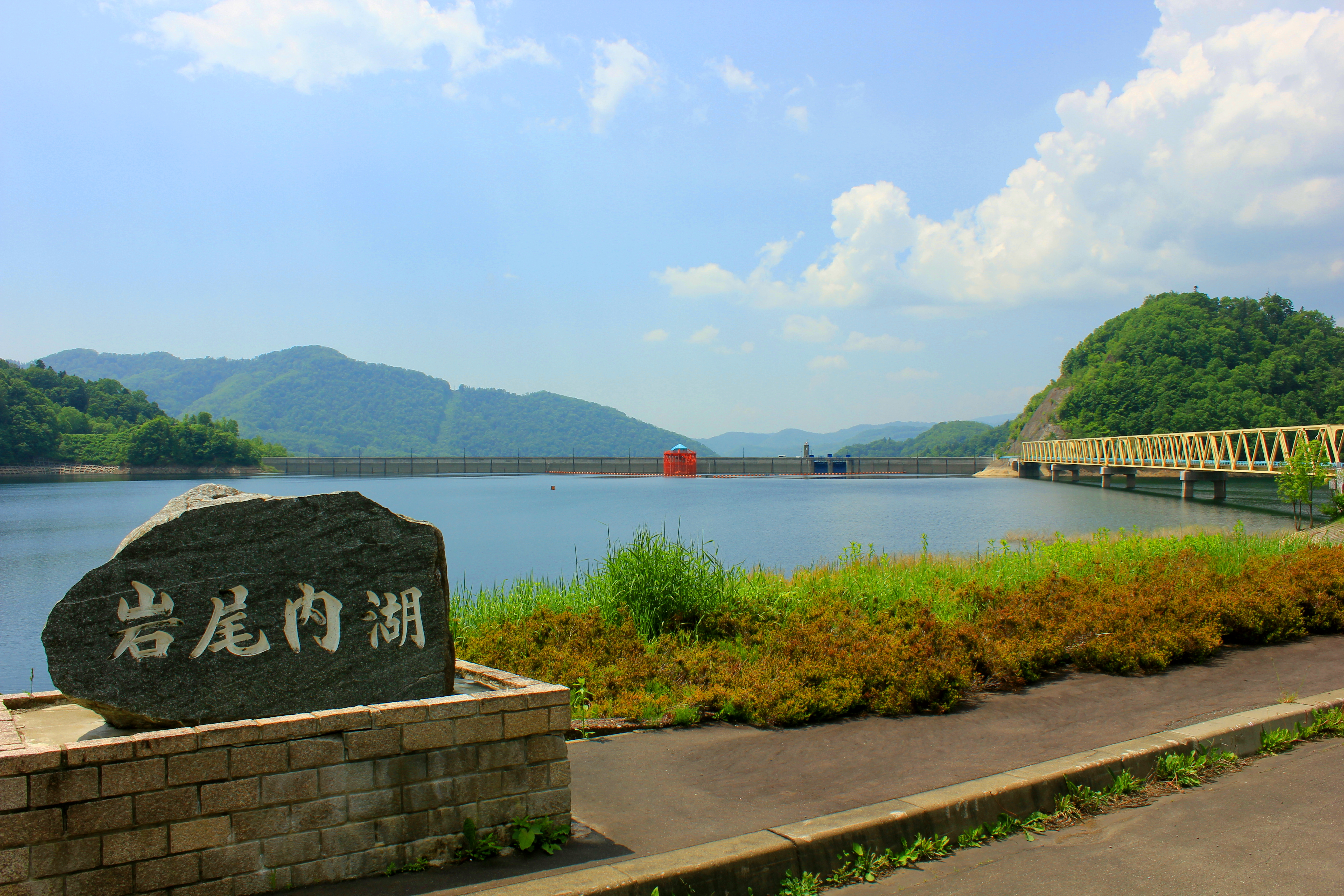 岩尾内湖石碑